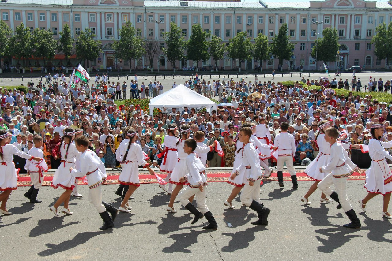 Концерт на празднике Пеледыш пайрем. город Йошкар-Ола Республика Марий Эл.